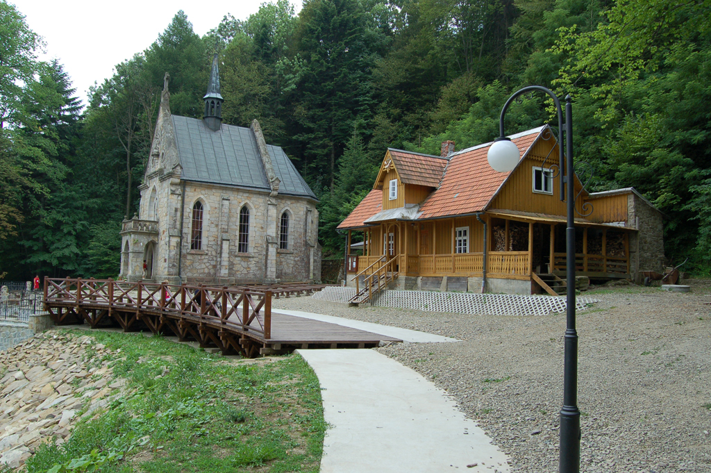 Neogotycka kaplica z 1908 roku postawiona w miejscu pustelni Jana z Dukli